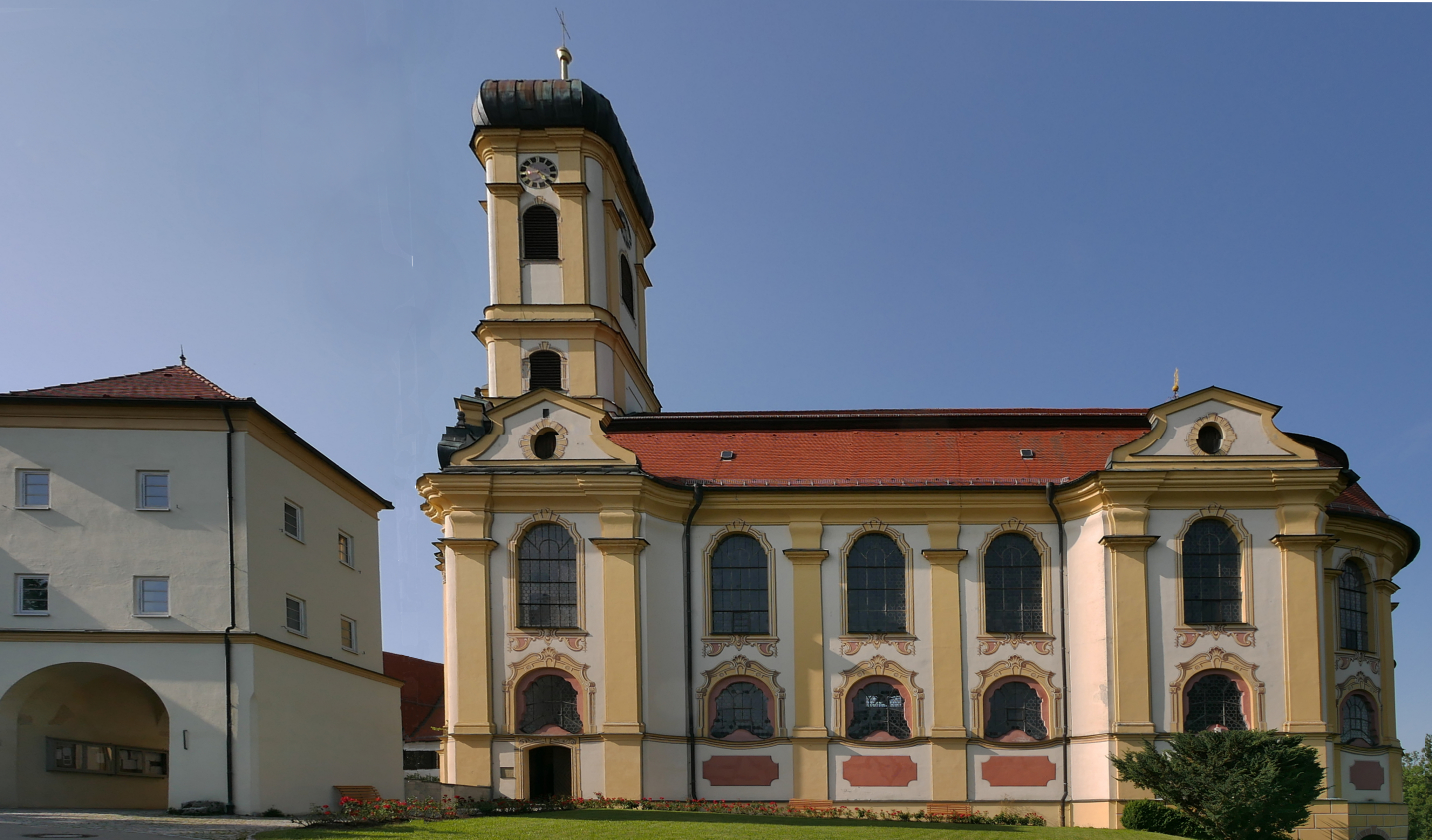 Die Wallfahrtskirche Maria Steinbach im Landkreis Unterallgäu (Bayern)